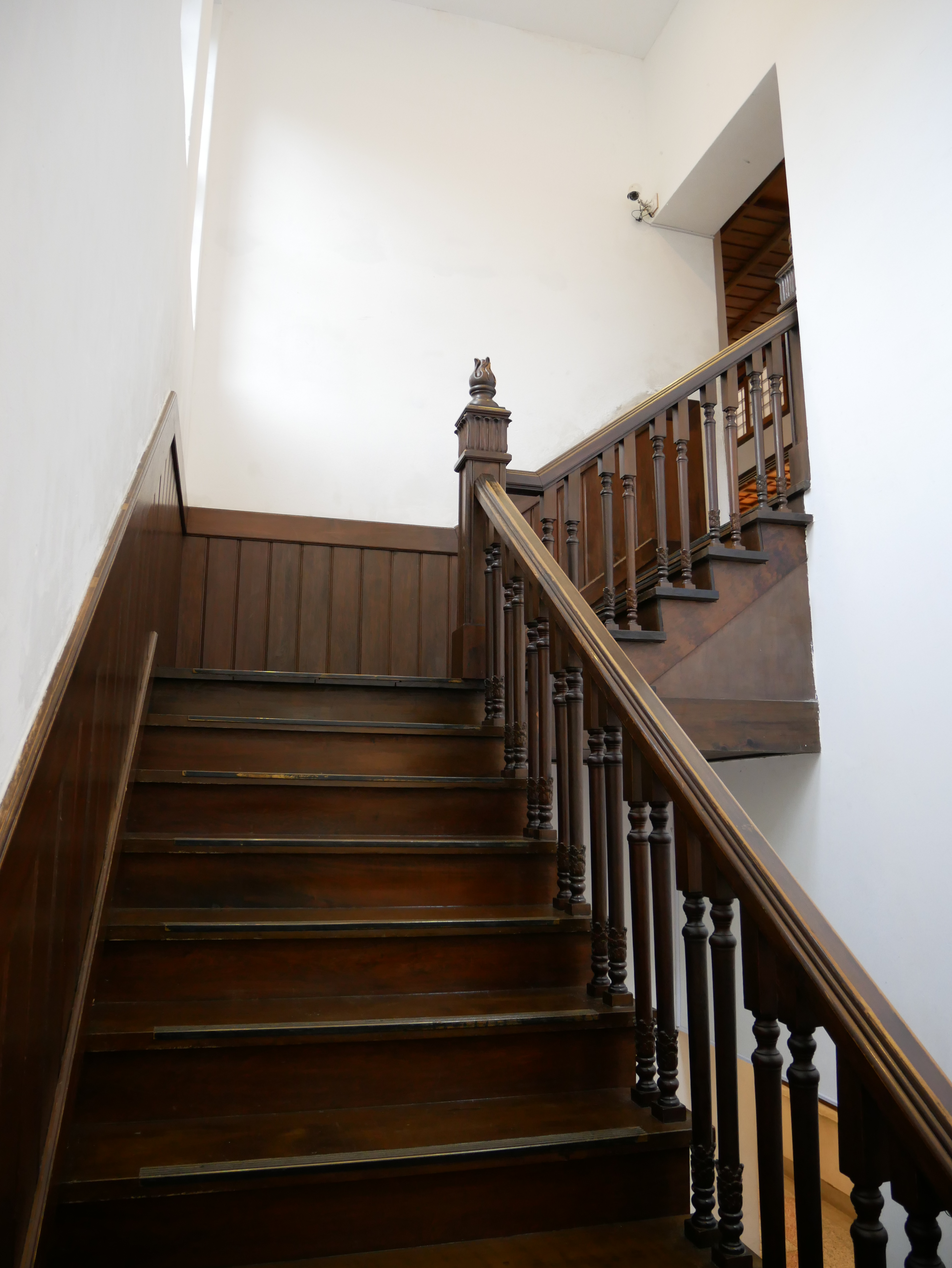 北投溫泉博物館的樓梯